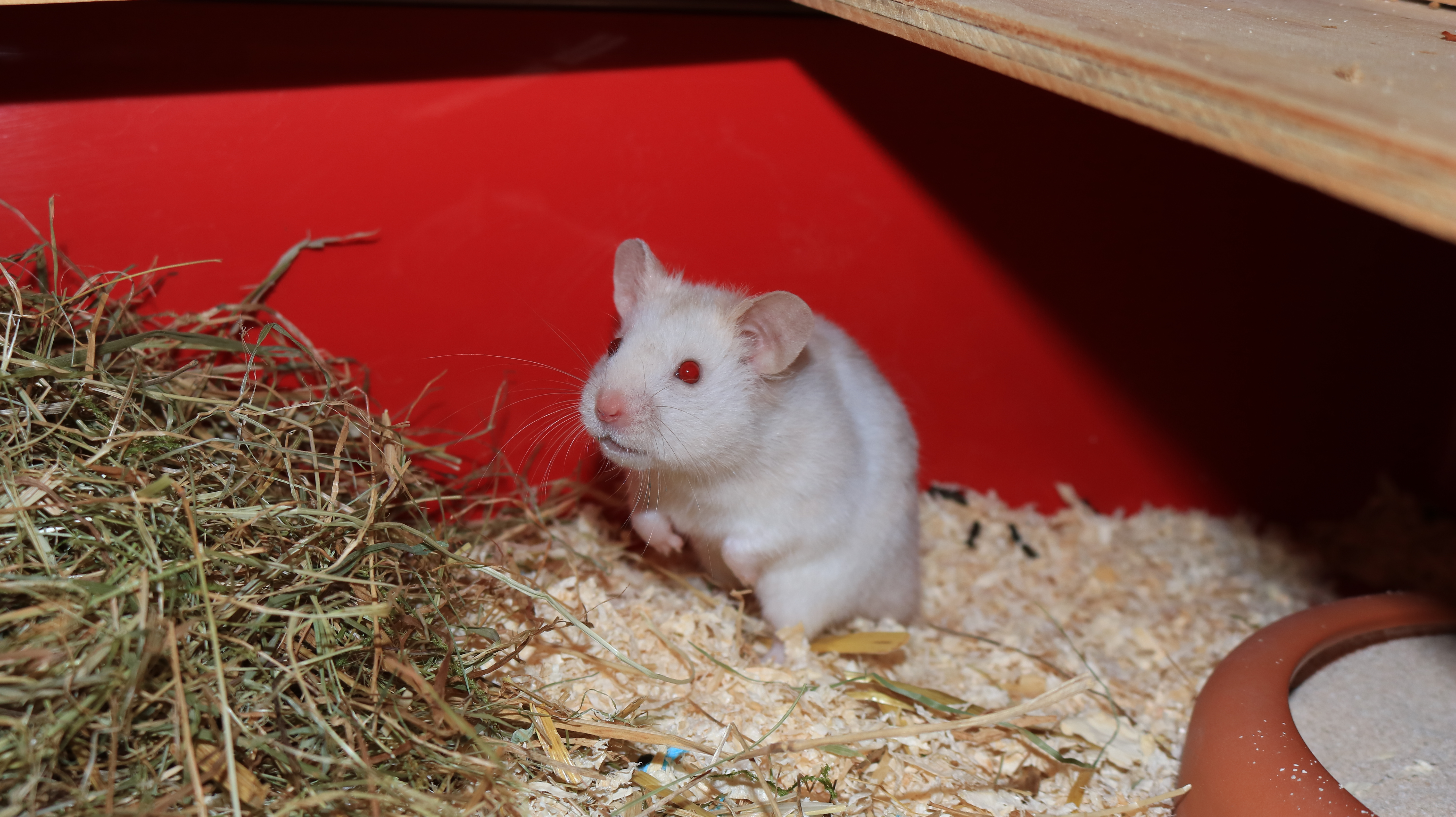 Ein Albino Goldhamster im Alter von ca. 12 Wochen